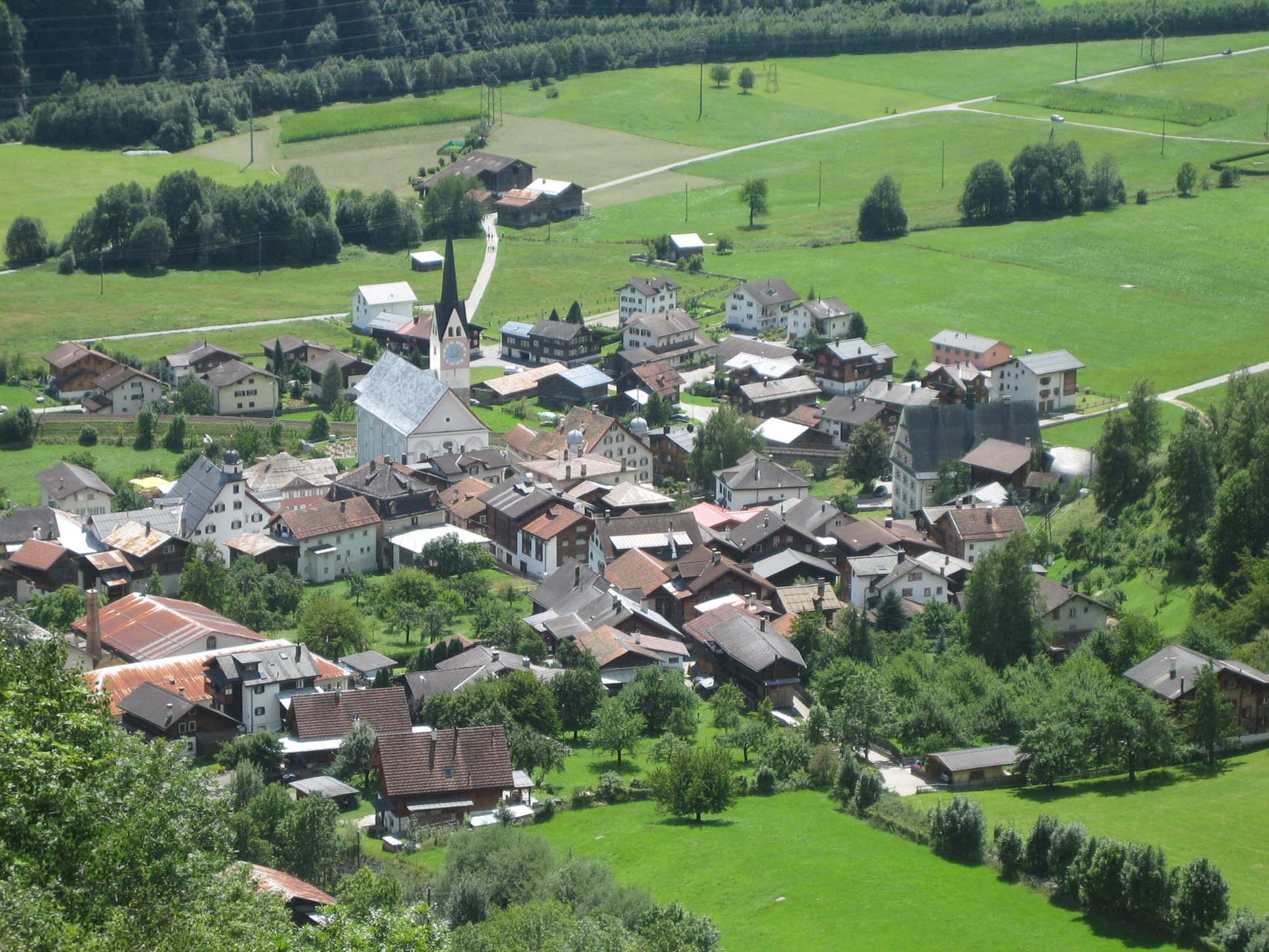 Trun